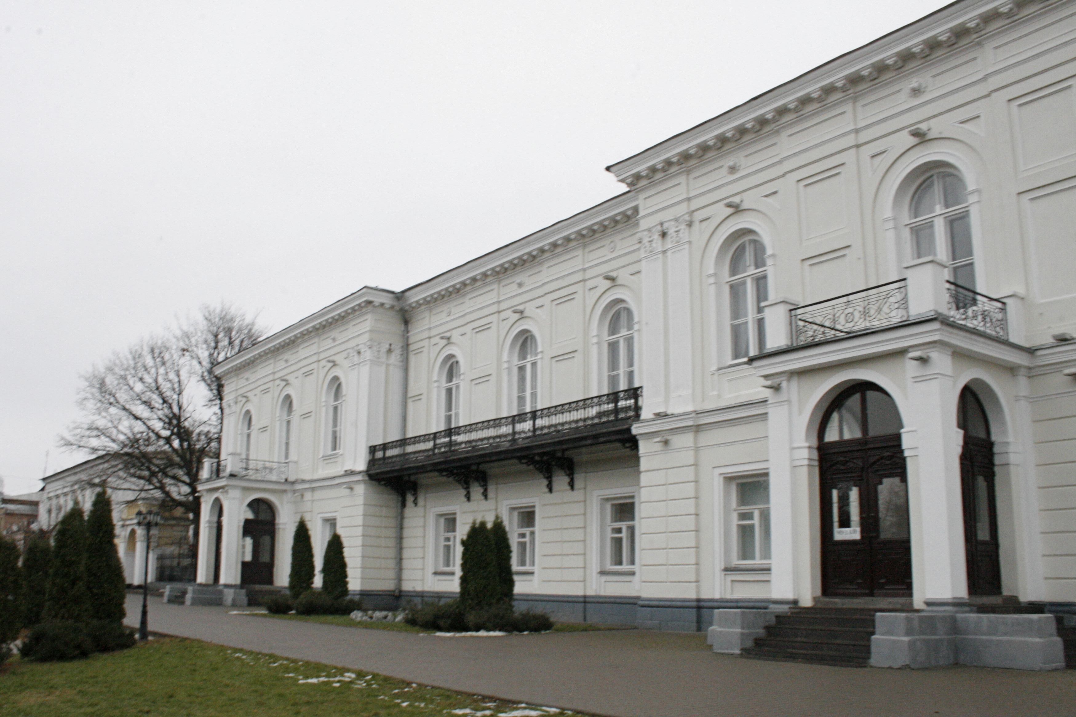 Здание атамановского дворца (Ростовская область, Новочеркасск, Дворцовая улица, 5А)